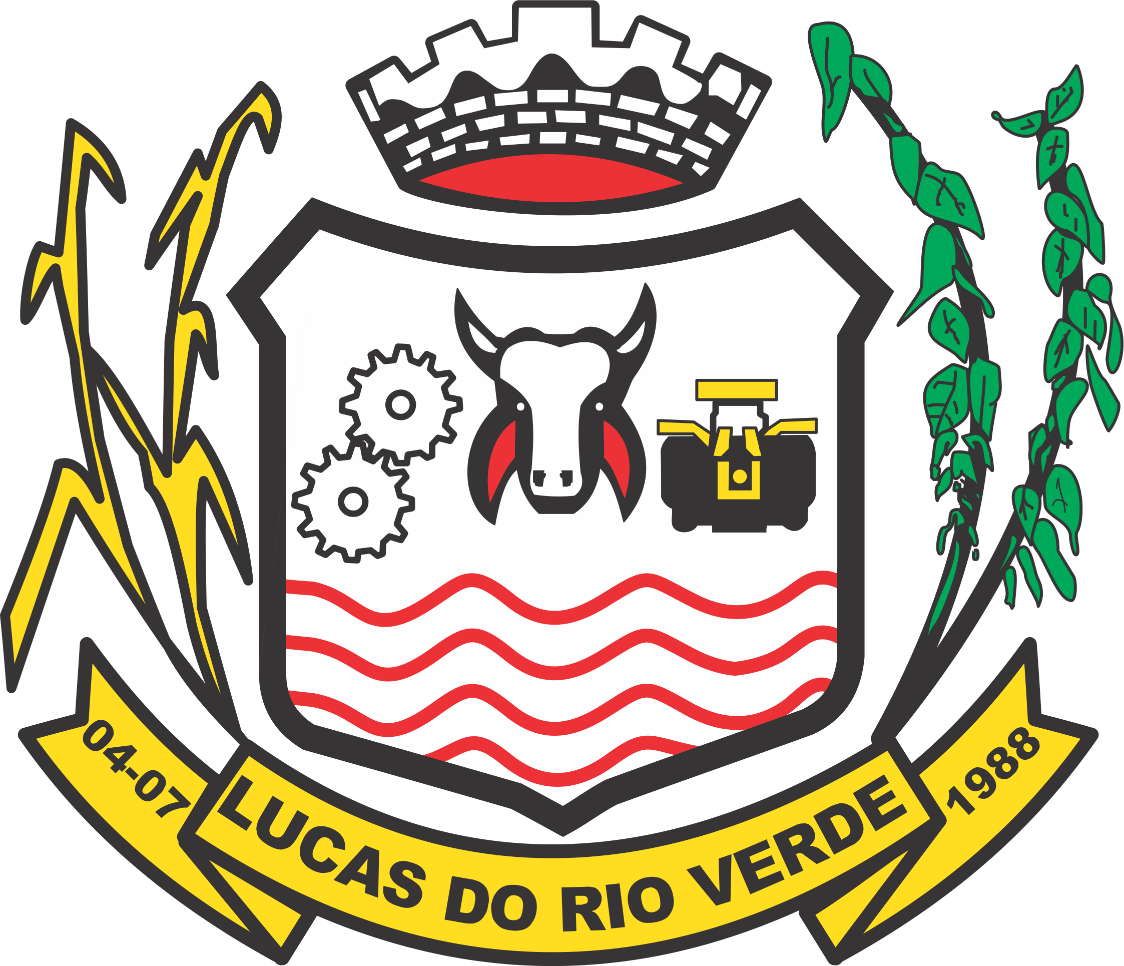 Brasão do município de Lucas do Rio Verde sobe autoria de João Aparecido Hernando de Mattos e oficializado pela Lei nº. 81/90.